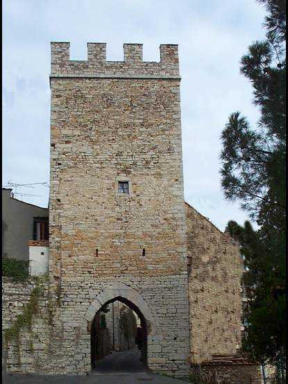 La Portaccia, ingresso lato Sud al castello